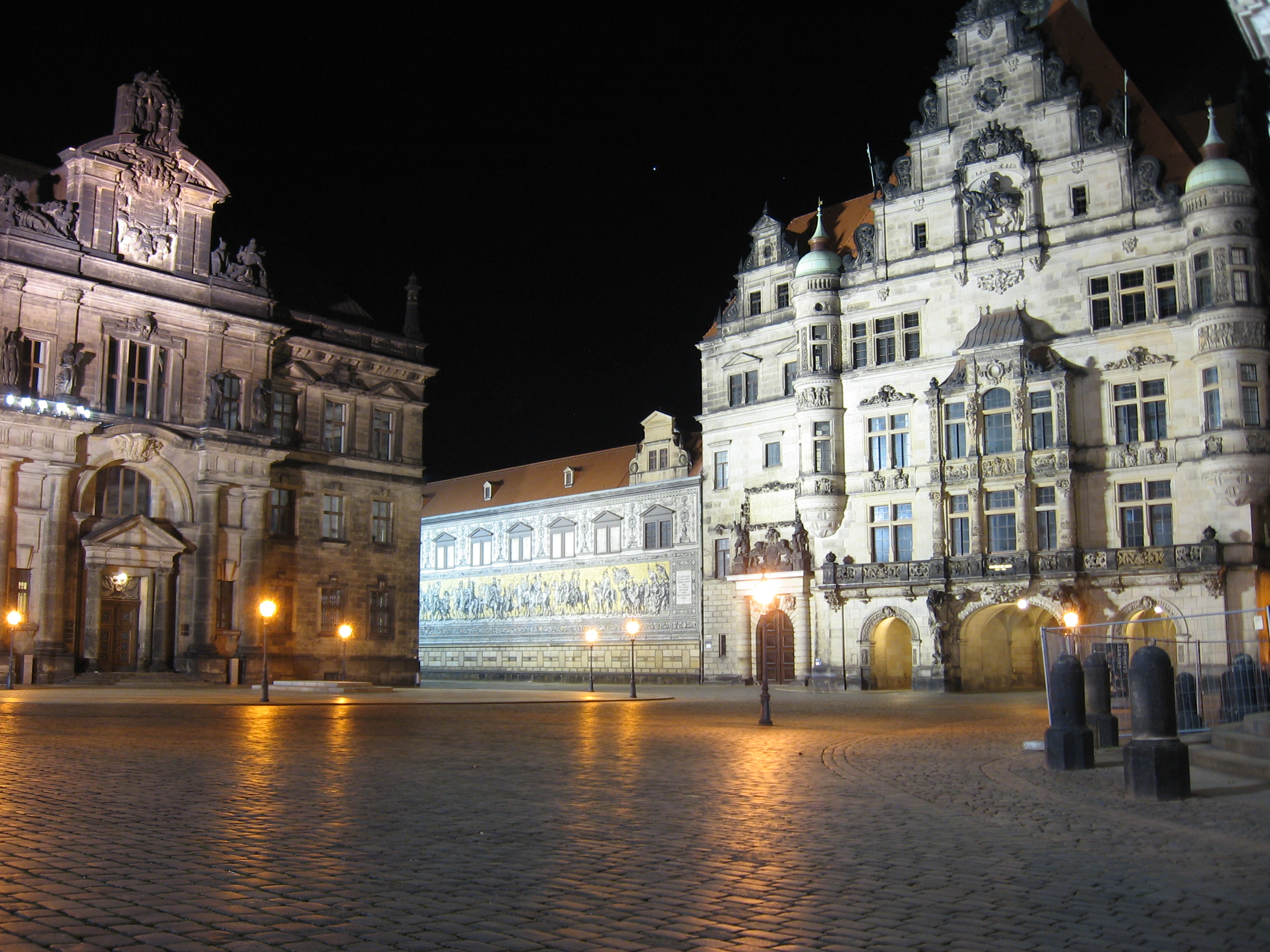 Fürstenzug in Dresden bei Nacht (vor der Hofkirche fotografiert)